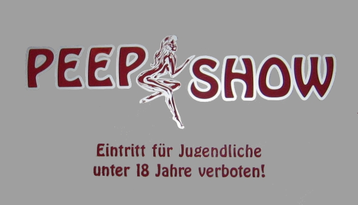 Peepshow door in Vienna, Austria, with the warning: "No teenagers under age of 18 allowed" Beschriftung der Außentür einer Peepshow in der Burggasse, Wien, mit dem Hinweis : "Eintritt für Jugentliche unter 18 Jahren verboten!"